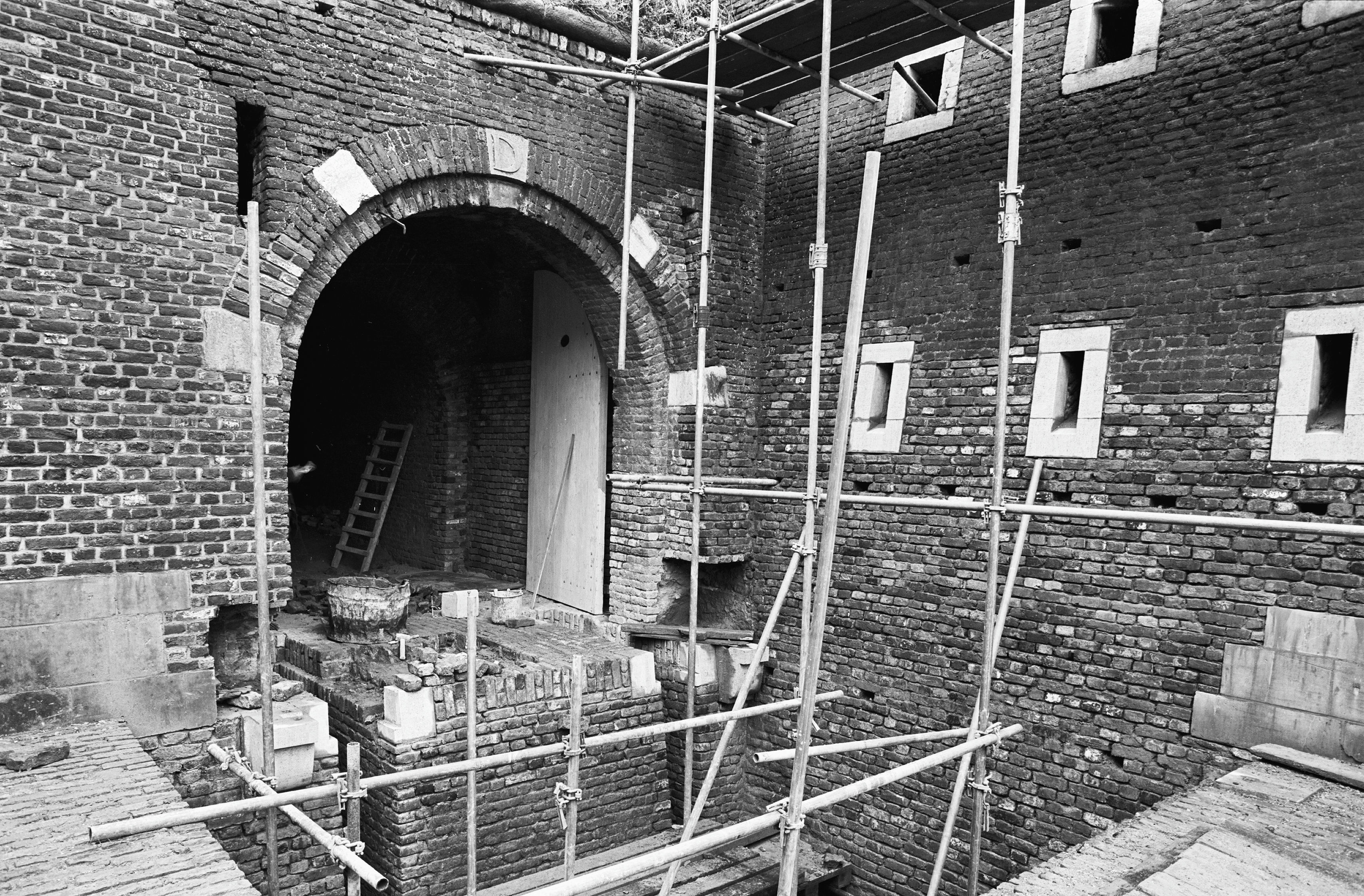 Restauratie van sortie D, tussen de linkerflank van bastion Holstein (links) en de rechterflank van bastion Erfprins, Linie van Du Moulin, Frontenpark, Maastricht. Voor de poortdoorgang een valkuil, waarover een valbrug lag. Rechtsonder: schietgaten. Rechtsboven: rookkanalen voor de kruitdampen.